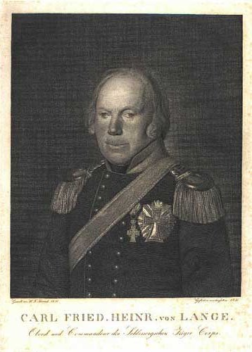 Carl Friedrich Heinrich (von) Lange (1760-1830), Danish Colonel